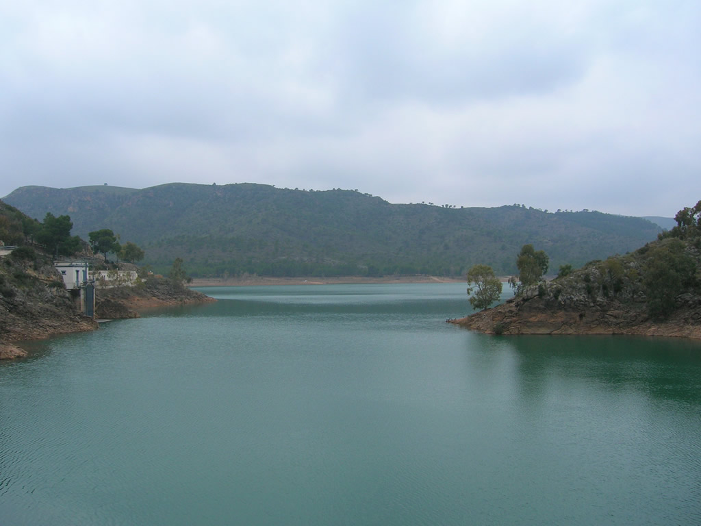 Embalse del Talave (río Mundo), en las proximidades de Liétor, Albacete, España. Talave reservoir, river Mundo, Albacete, Spain. Own work given to PD.